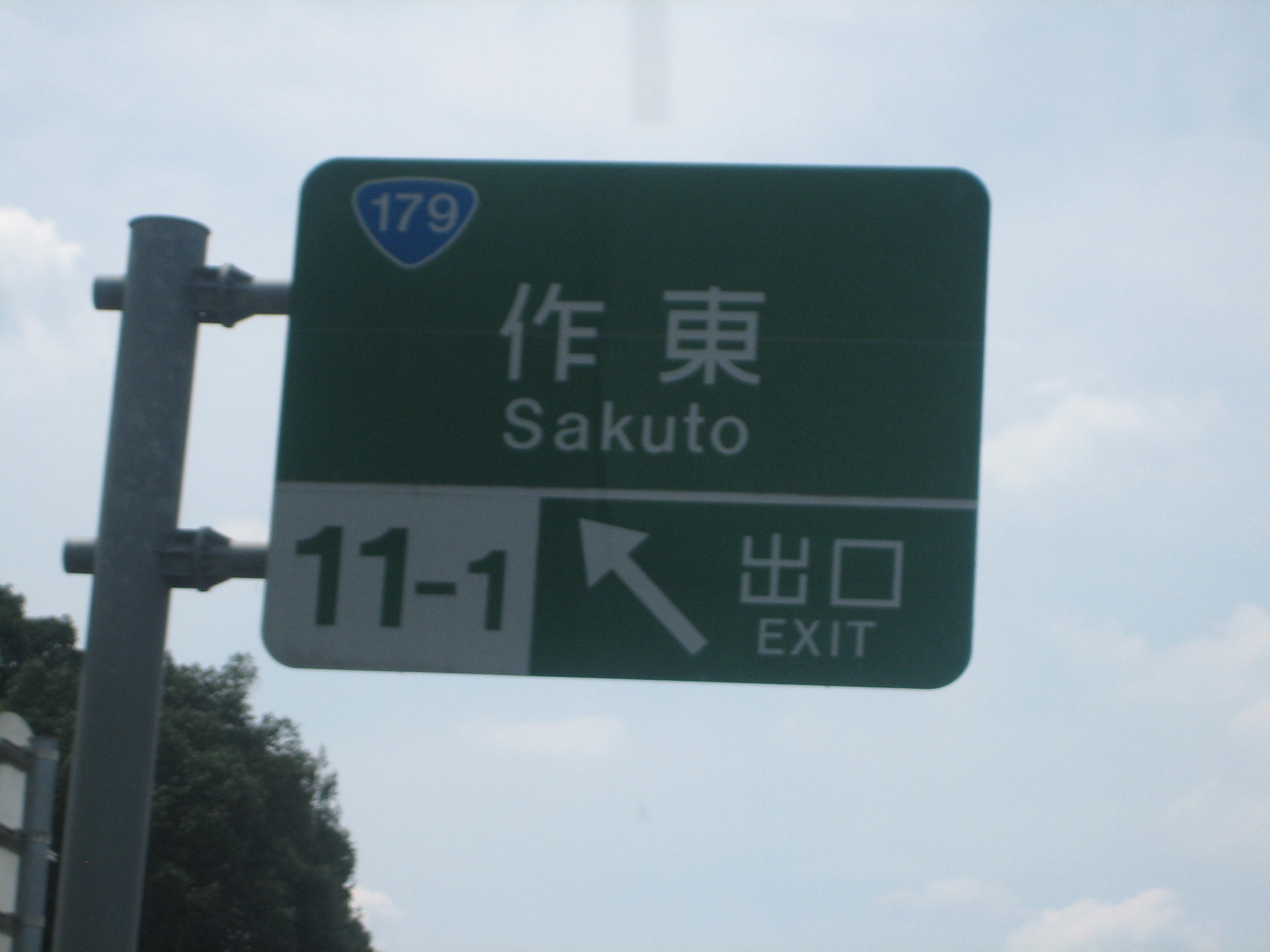 作東IC出口